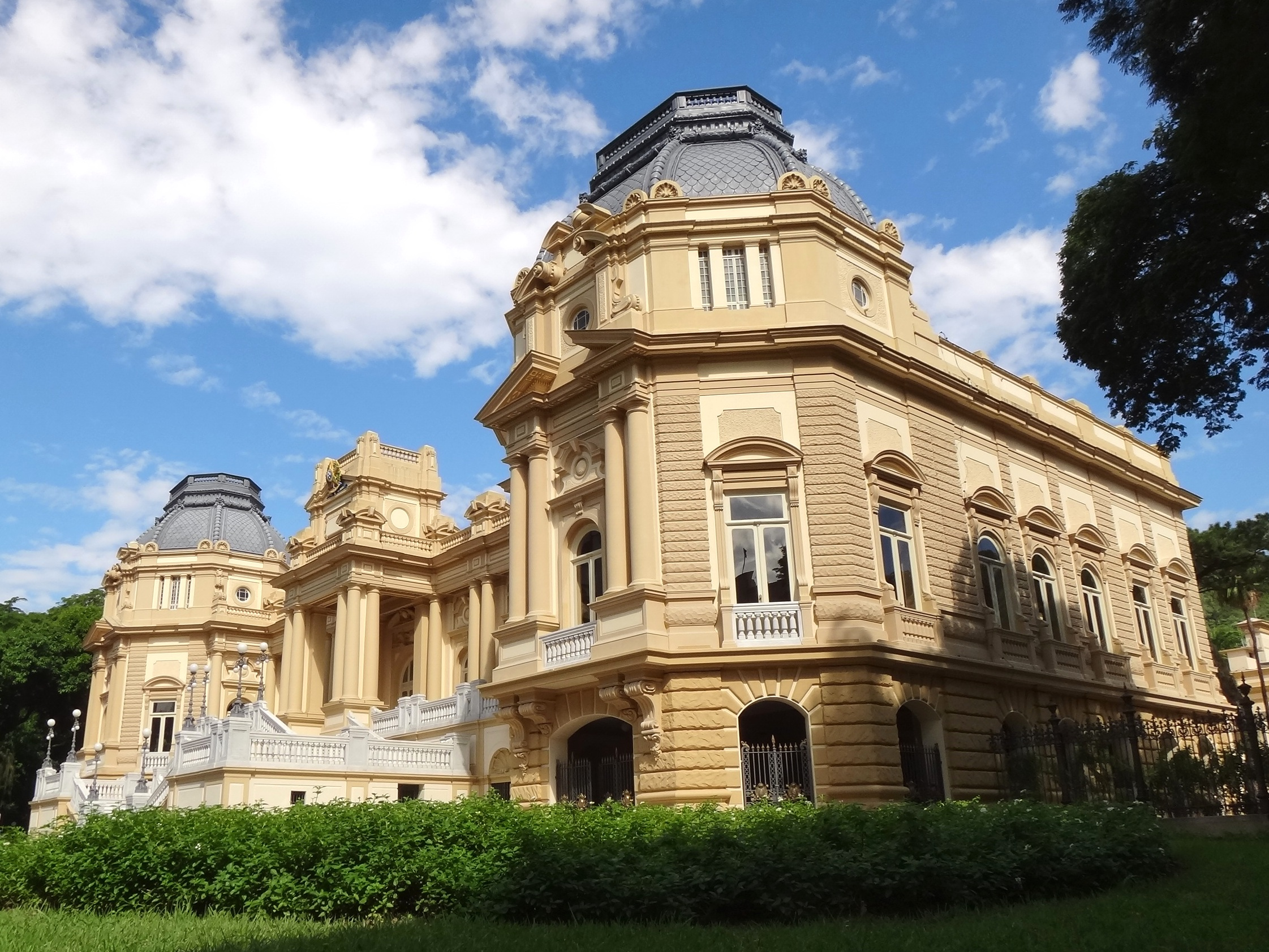 Vista lateral do Palácio Guanabara